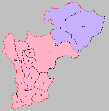 岐阜県益田郡の町村制時点の町村。